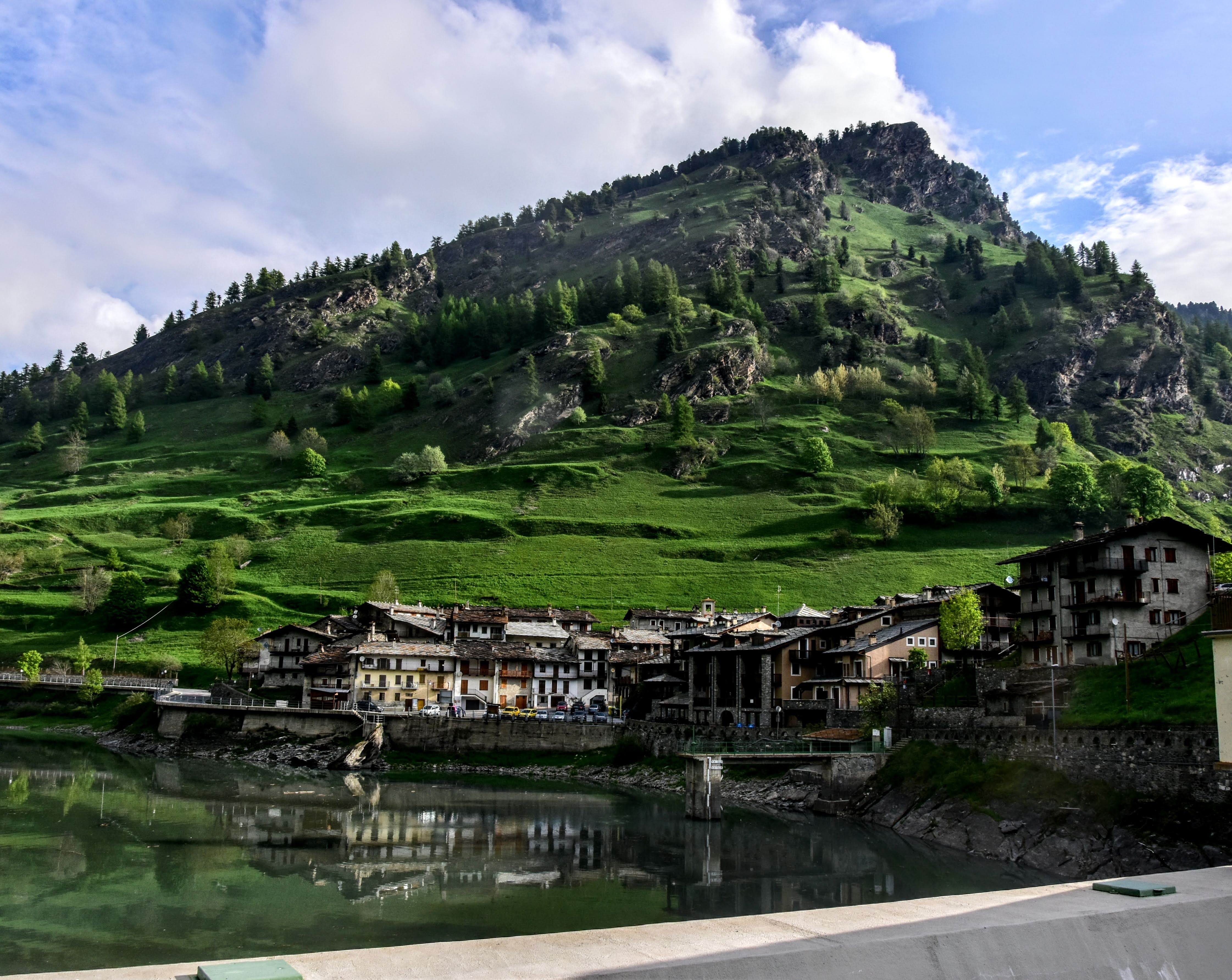 Parco del Monviso .